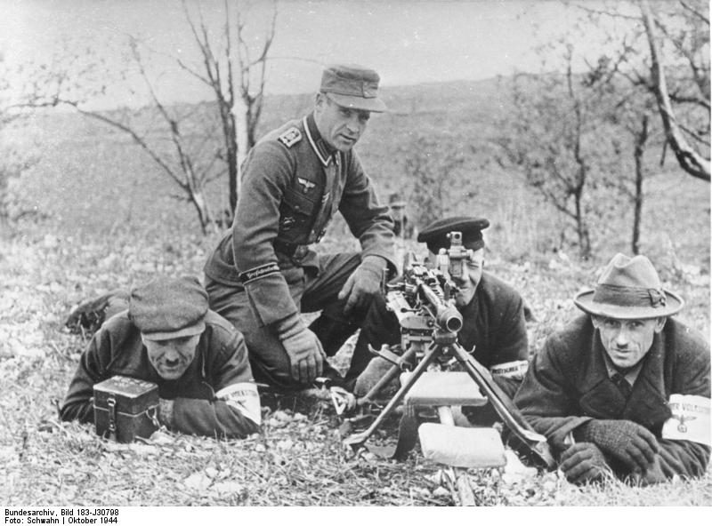 Ostpreussische Volkssturm-Männer in der Ausbildung bei der Division "Großdeutschland" Wiederholt hat der Wehrmachtbericht bereits den erfolgreichen Einsatz ostpreussischer Volkssturm-Bataillone bei der Abwehr der bolschewistischen Grossangriffe gemeldet. Immer neue Bataillone sind in Aufstellung und Ausbildung begriffen. Frontbewährte Ausbilder hat u.a. auch die Pz.Gren.Div. "Grossdeutschland" für die Ausbildung der Volkssturm-Grenadiere bereitgestellt. In kürzester Zeit lernen die alten weltkriegserfahrenen Soldaten und die durch Wehrsportausbildung und in Wehrertüchtigungslagern vorgeschulten jüngeren Jahrgänge mit den neuzeitlichen Waffen umzugehen. Scherl- Bilderdienst (Schwahn) 1.11.1944 [Herausgabedatum]